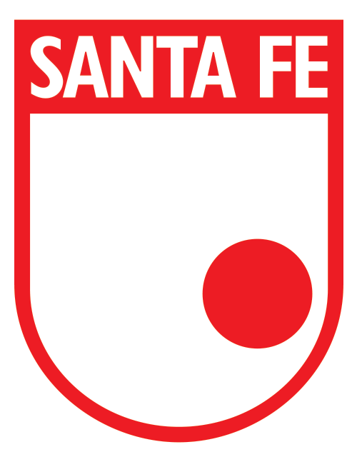 Escudo del club de fútbol Independiente Santa Fe